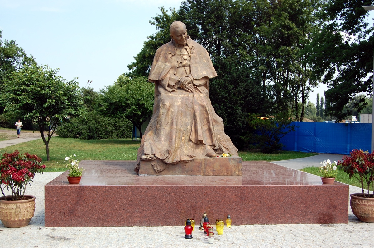 Pomnik Jana Pawła II w Toruniu